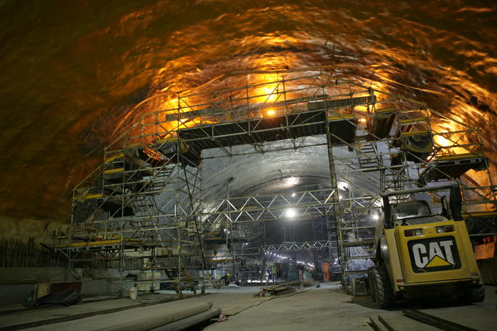 Trabajos de extensión de la línea H del subte de Buenos Aires.